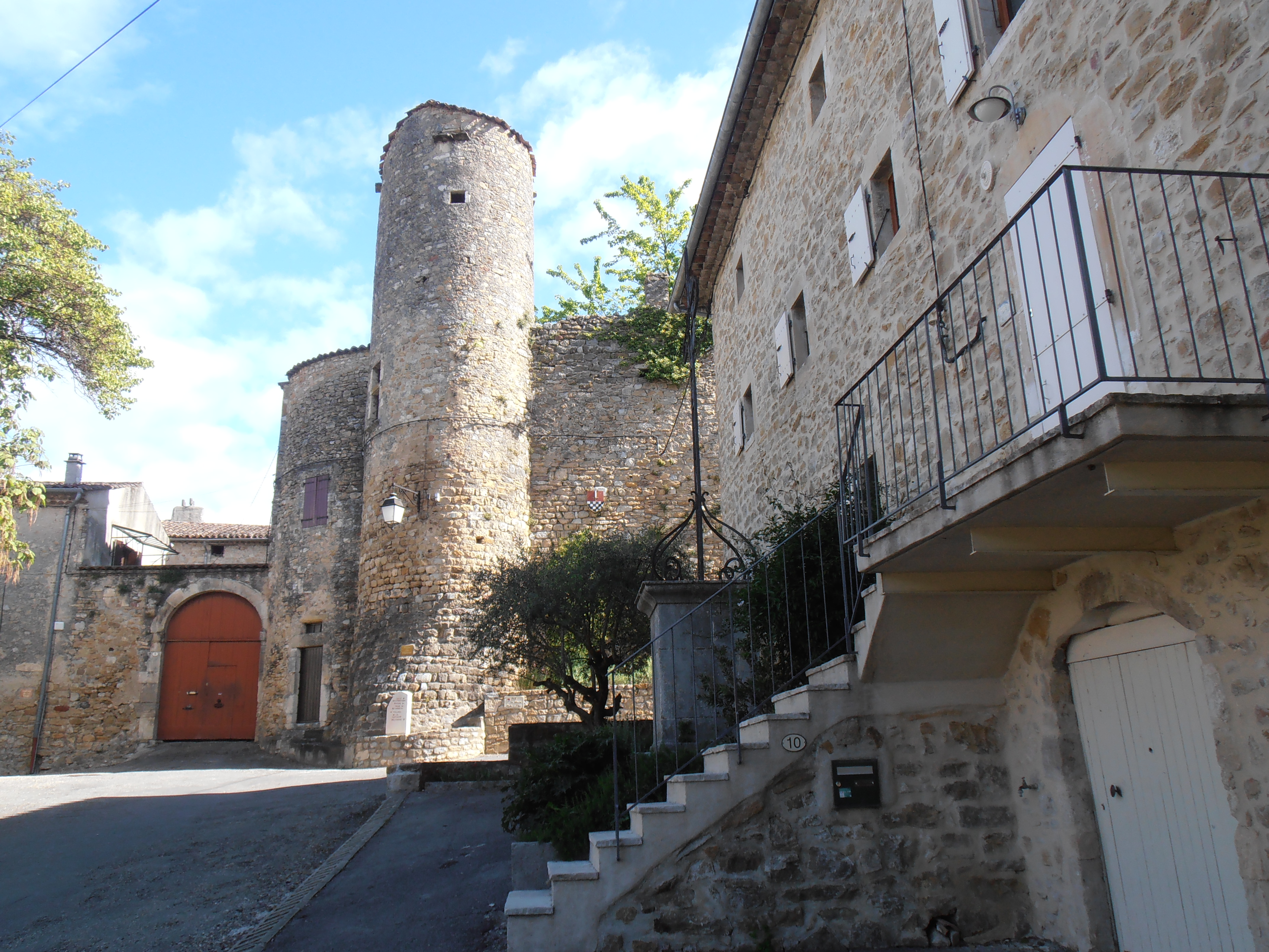 Ardèche, Salavas, Château du XIIe siècle, agrandi aux XVe et XVIe siècle, et détruit en 1628 durant les guerres de religion. Un nouveau château a été construit fin XVIIe, début XVIIIe siècle. Dans la salle basse de l’enceinte une exposition présente les différentes formes de sépultures et les pratiques funéraires au fil des siècles, grâce aux 250 sépultures - dégagées sur le site de la Gleizasse - et qui ont été étudiées. Les pierres des démolitions des églises de la Gleizasse ont été réemployées en 1581 par Mathieu de Merle pour les défenses de son château.